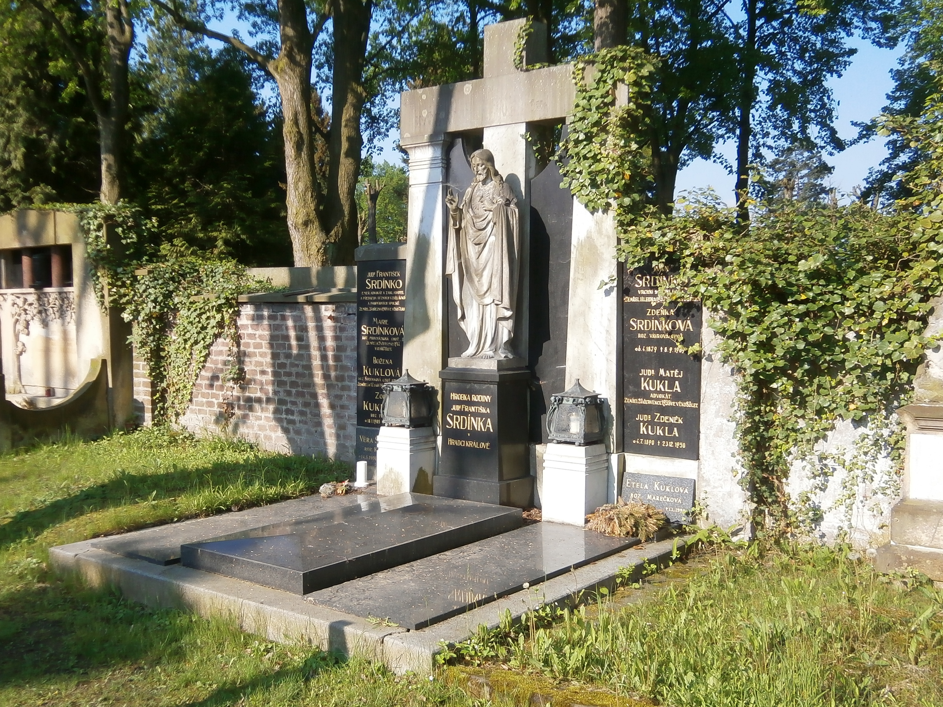 Hřbitov v Kuklenách